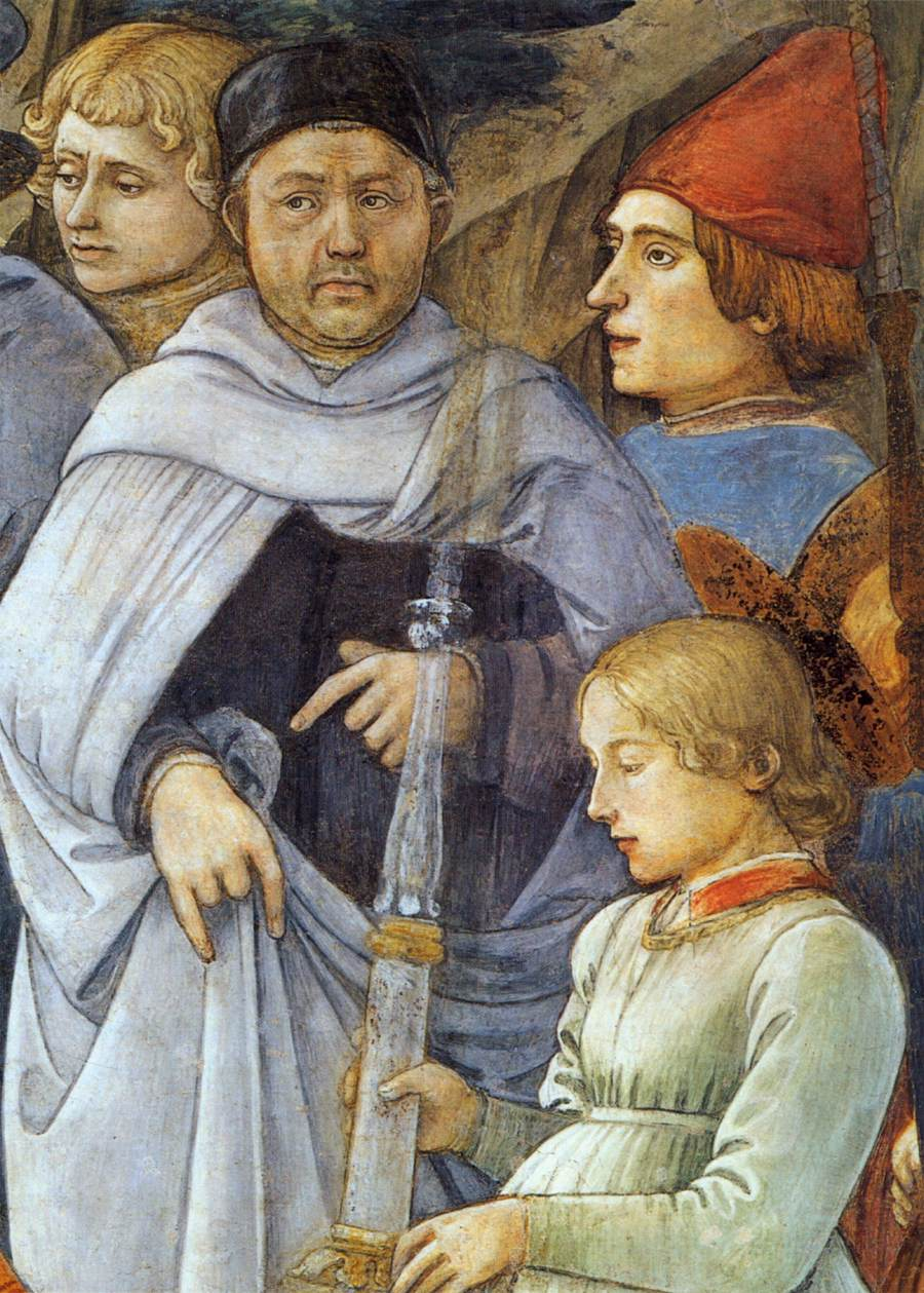 detail